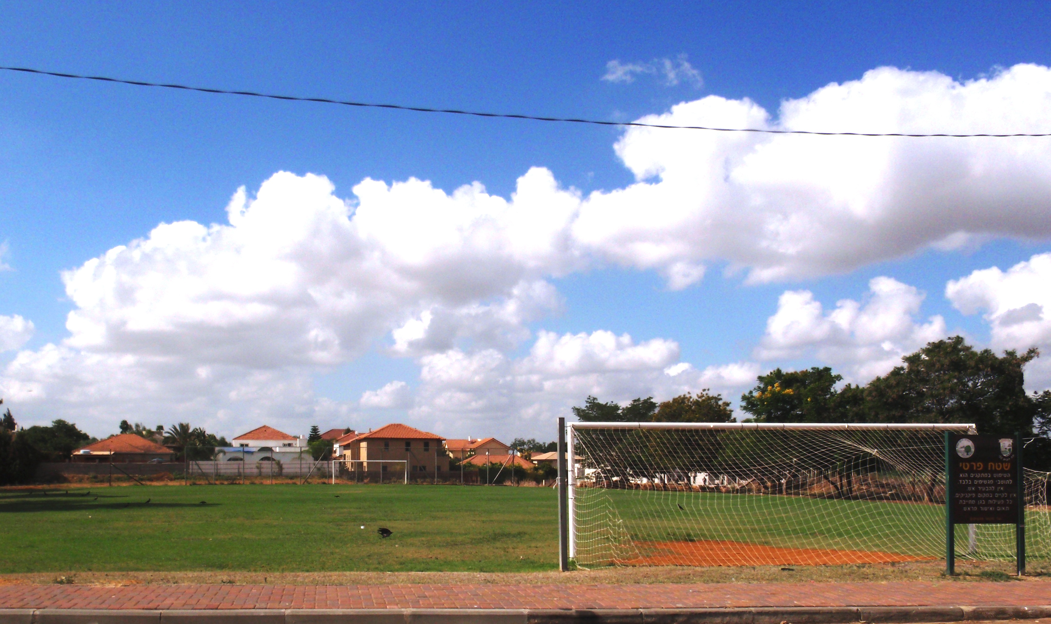 מגשימים מגרש כדורגל